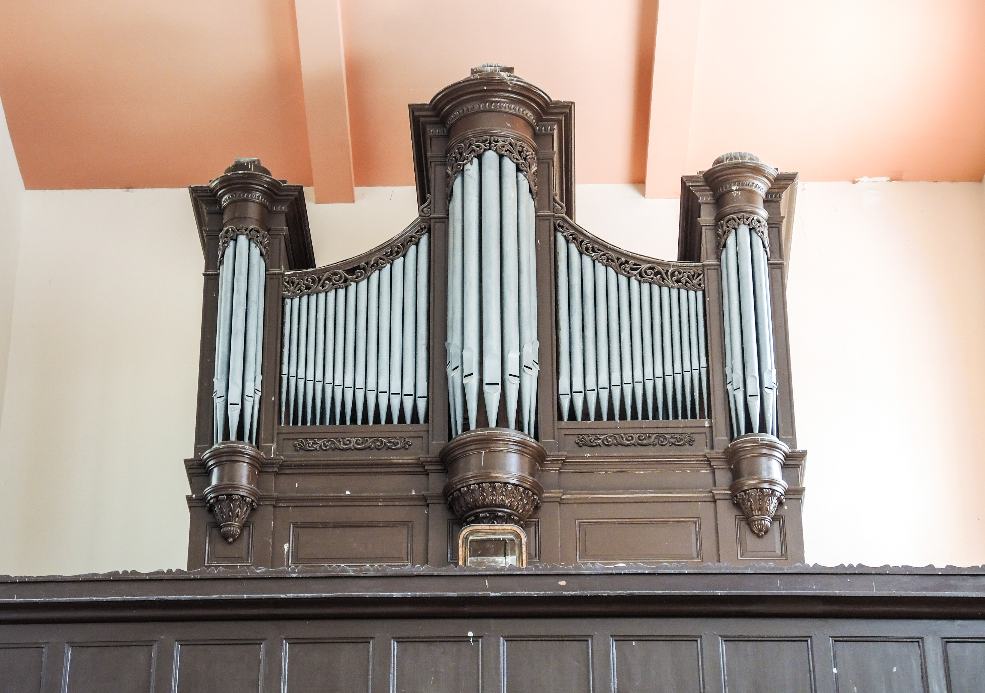 Orgue Claude Ignace Callinet vers 1860. Église saint Vincent. Lachapelle-sous-Rougemont. Territoire de Belfort